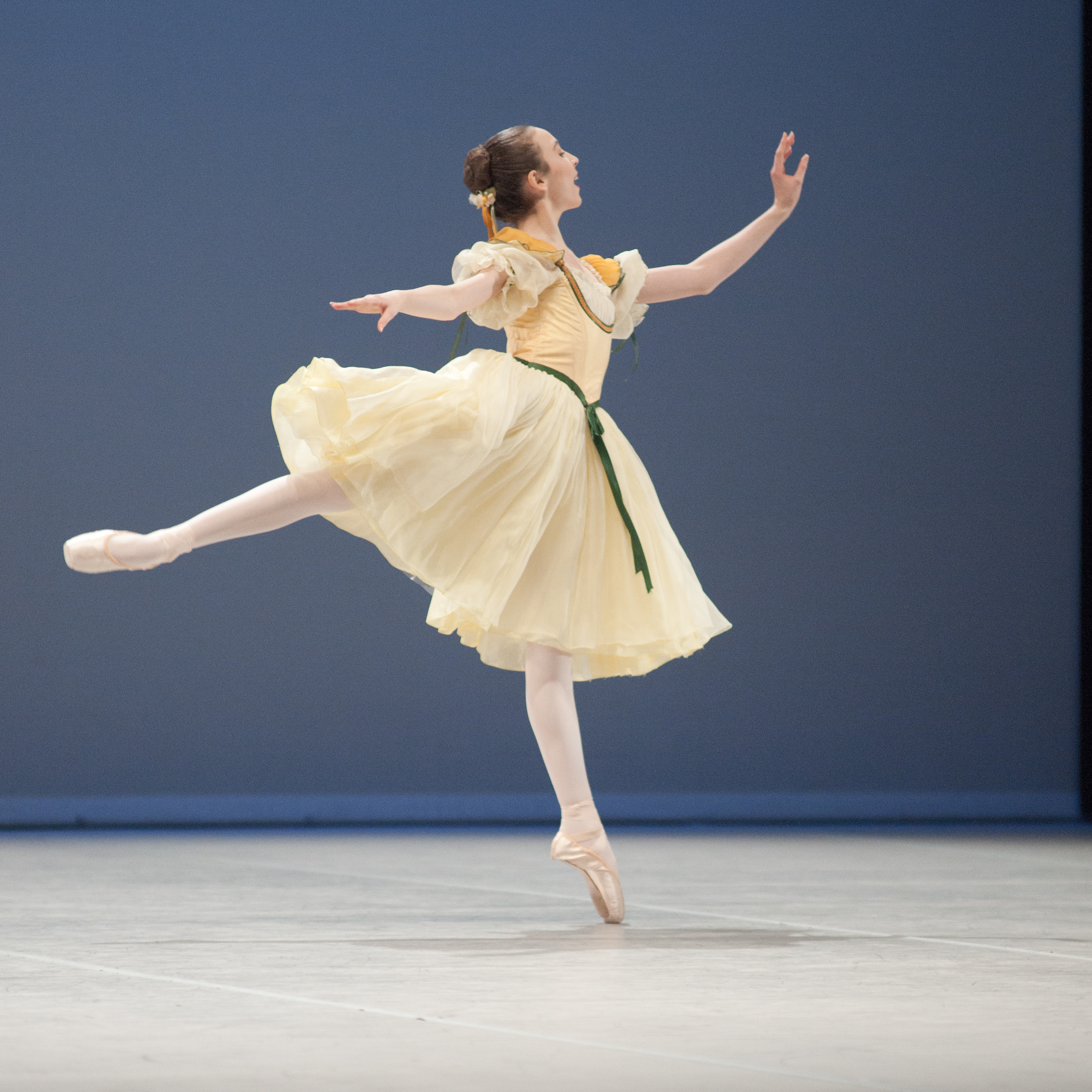 Variation extraite de Coppélia au Prix de Lausanne 2010.